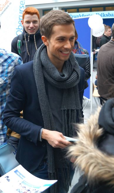 TV-Moderator Christoph Hoffmann bei der "Oberursel Ausbildungstour 2015"